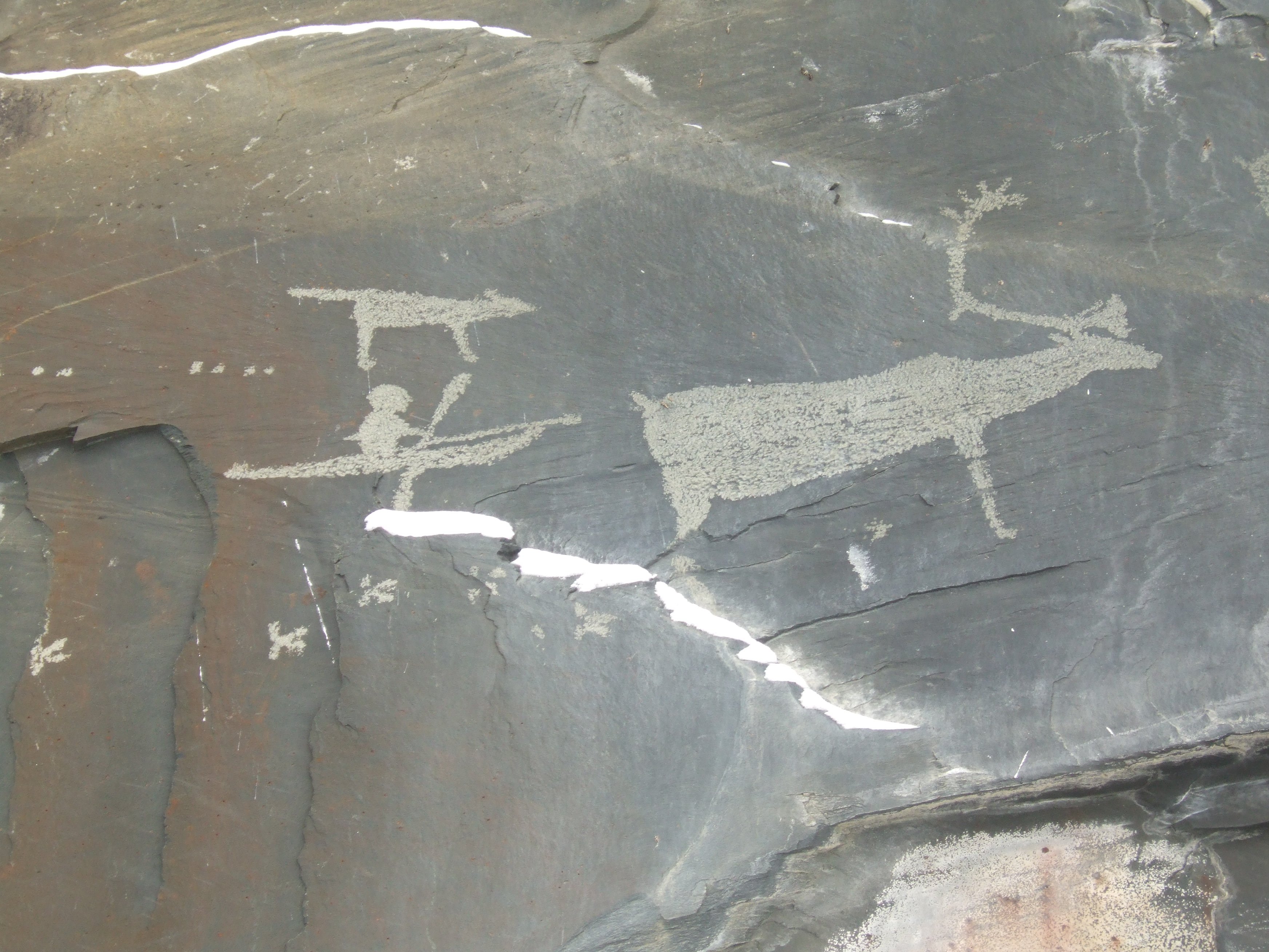 Пегтымельский, Иультинский район This image is related to the protected area of Russia number 8710026